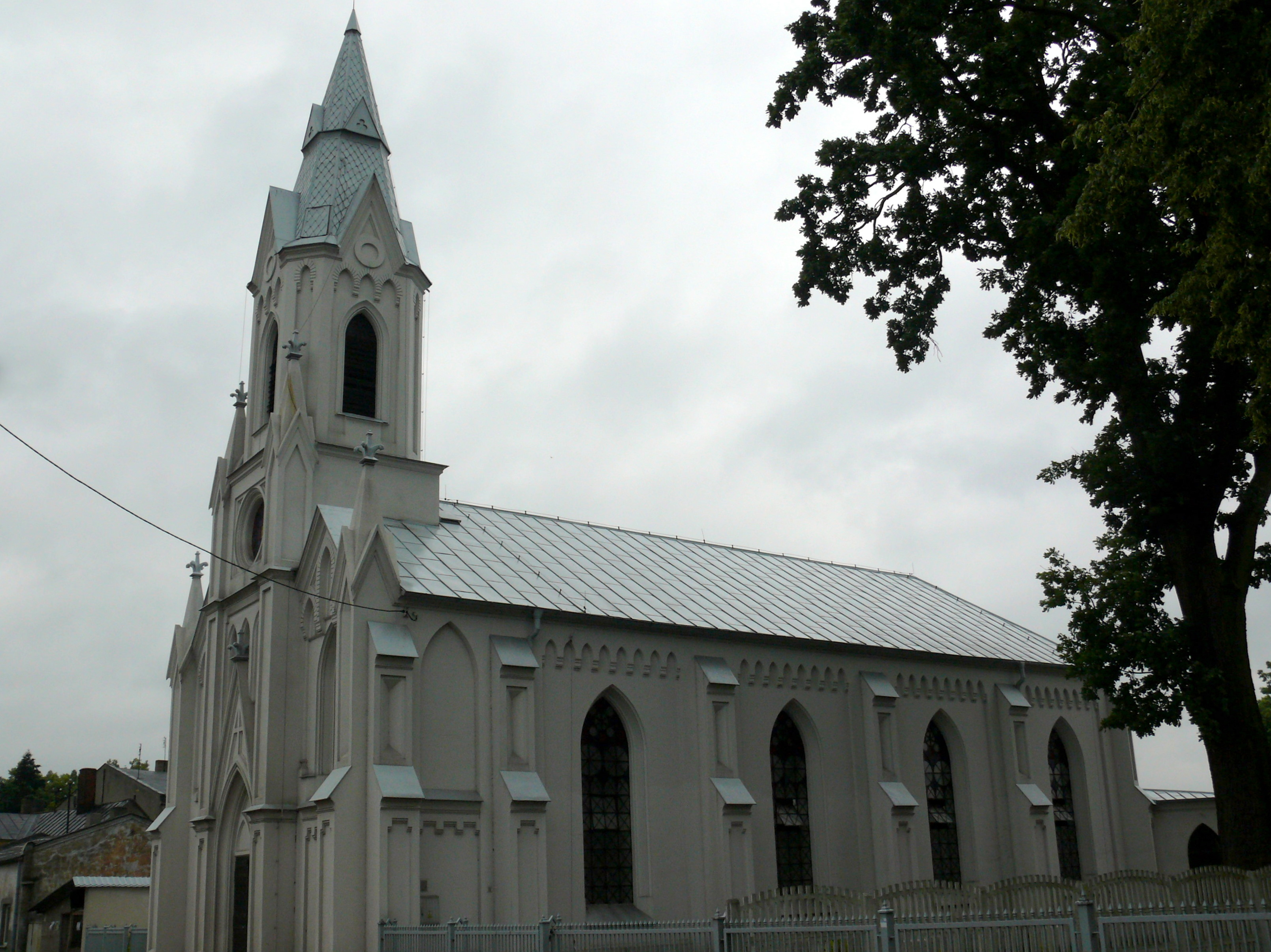 Dawny kościół ewangelicki w Dąbiu nad Nerem